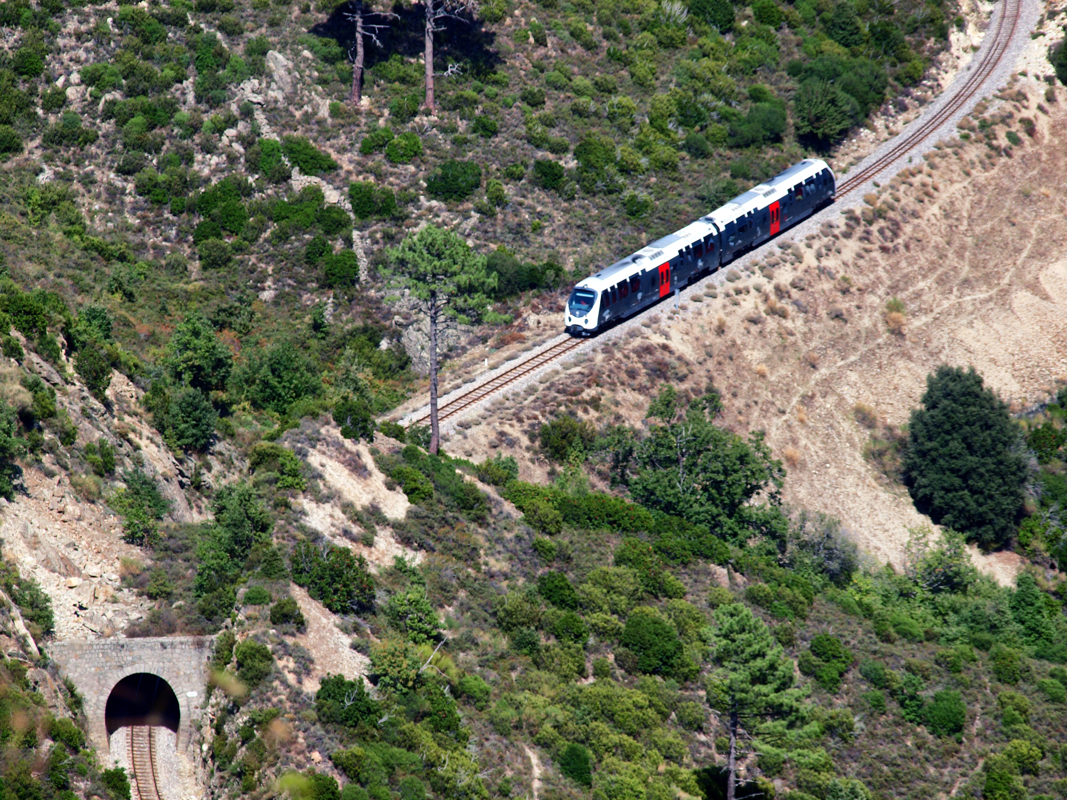 Vivario, Centre Corse - Rame AMG 800 entre la gare et le Pont Eiffel sur le Vecchio